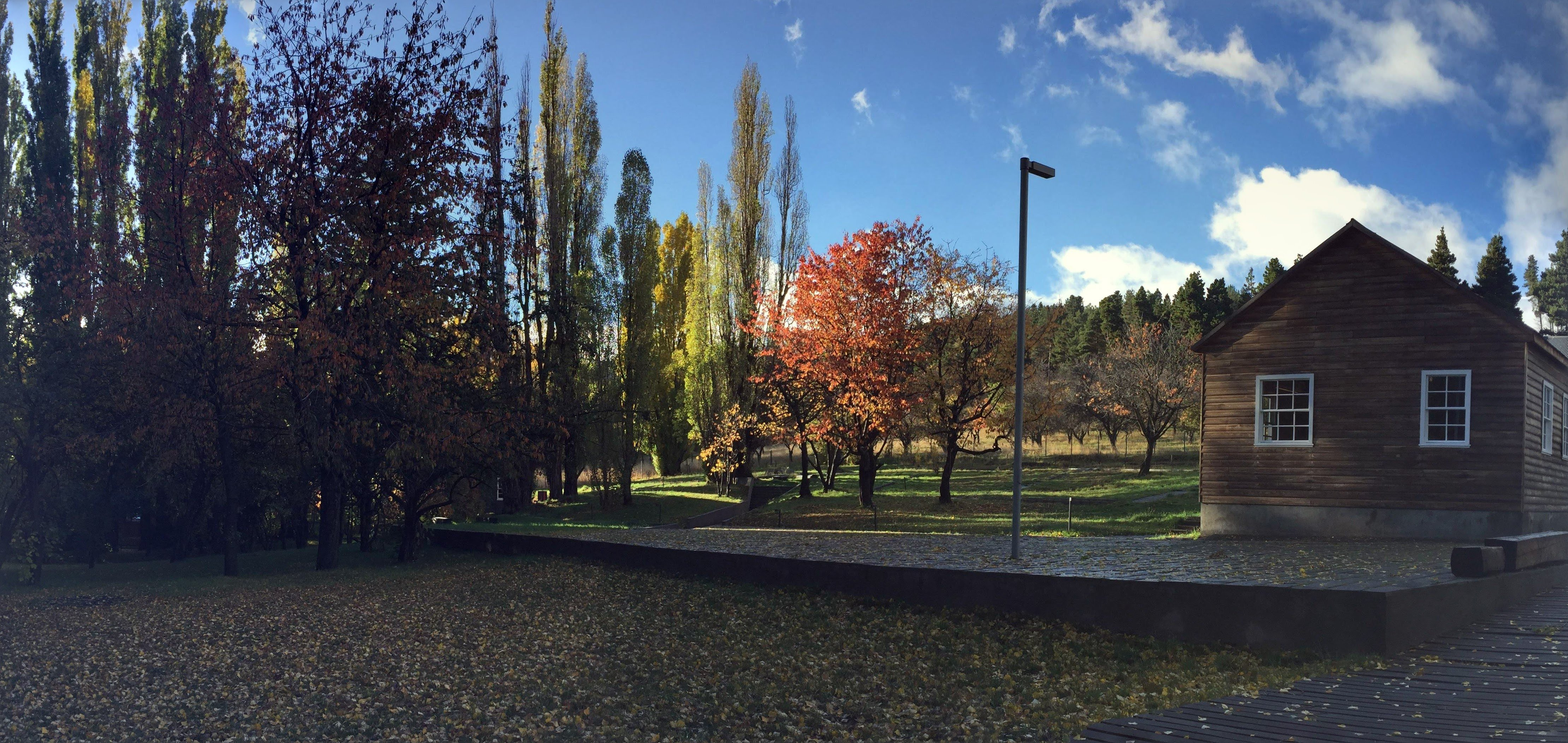 Fotografía de antigua Oficina del Contador de la Sociedad Industrial de Aysén y el parque del Museo Regional de Aysén. Otoño de 2018.